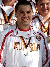 Алексей Алипов